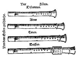 Bild aus dem 1529 veröffentlichten Werk "Musica instrumentalis deudsch".